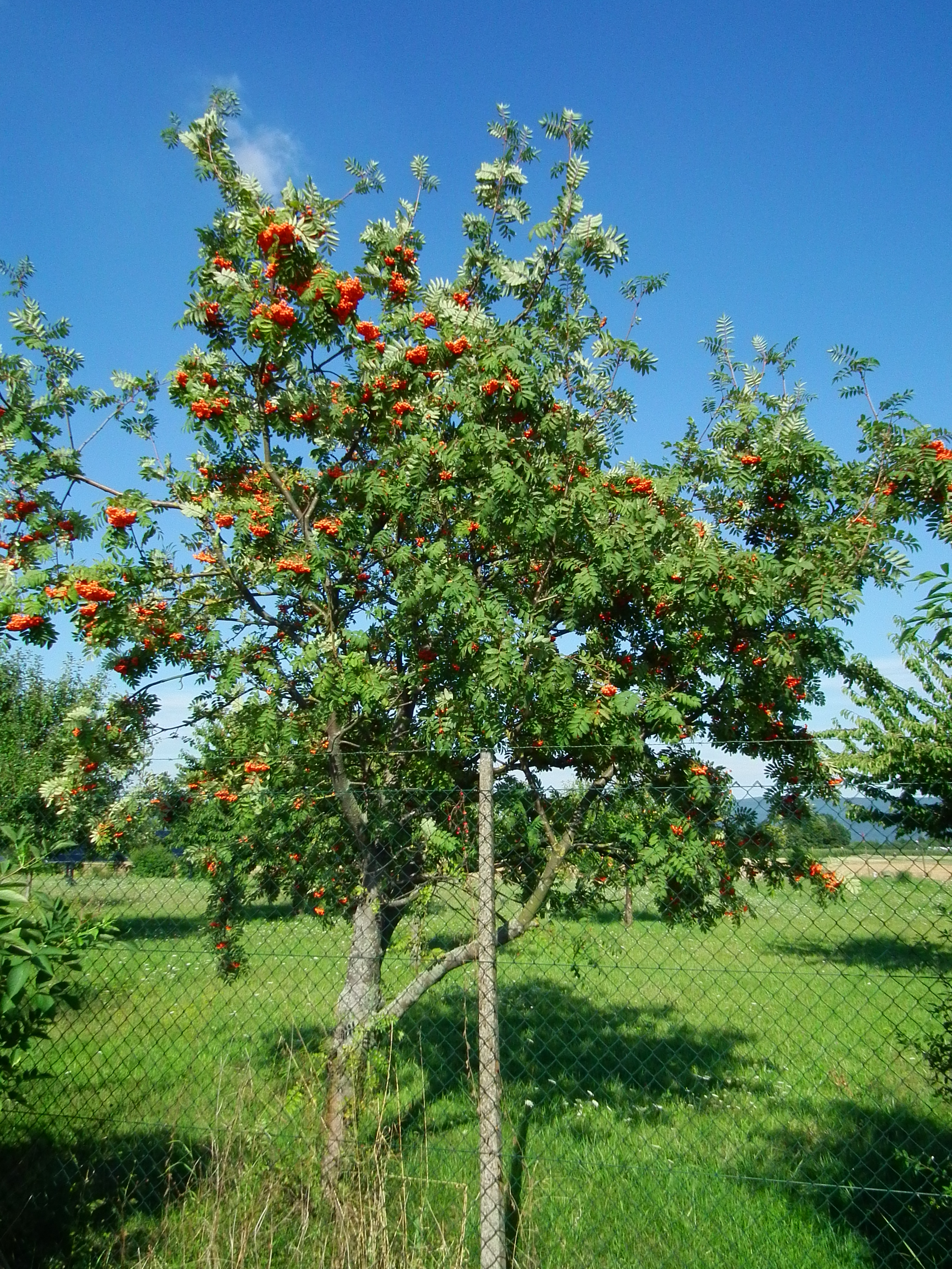 Vogelbeeren (Sorbus aucuparia), fotografiert im nördlichen Baden-Württemberg, Deutschland)